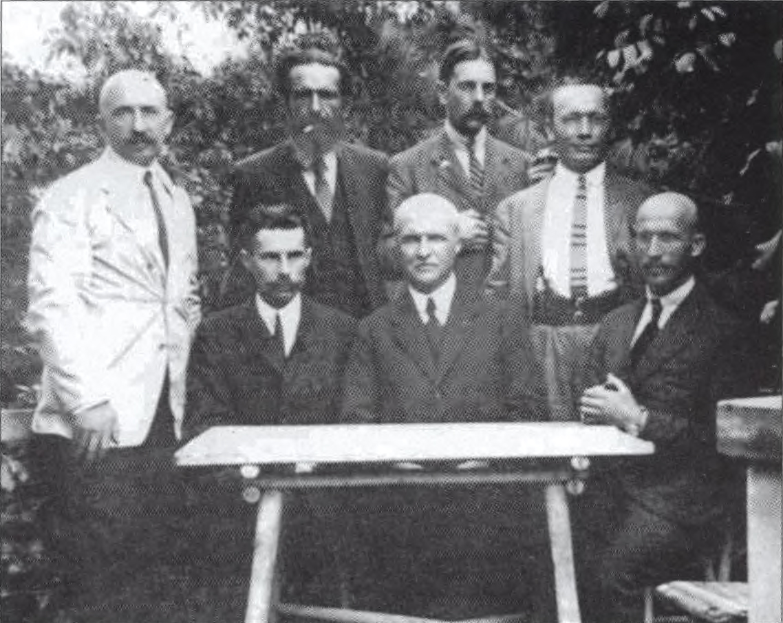 В'ячеслав Липинський і гетьман Павло Скоропадський (в центрі) серед членів Українського союзу хліборобів=державників, 1927 року. Праворуч від гетьманасидить Сергій Шемет. В 2-му ряду (зліва направо): Олександр Скоропис-Йолтуховський, Сава Крилач (Людвіг Седлецький, Адам Монтрезор, Ігор Лоський.